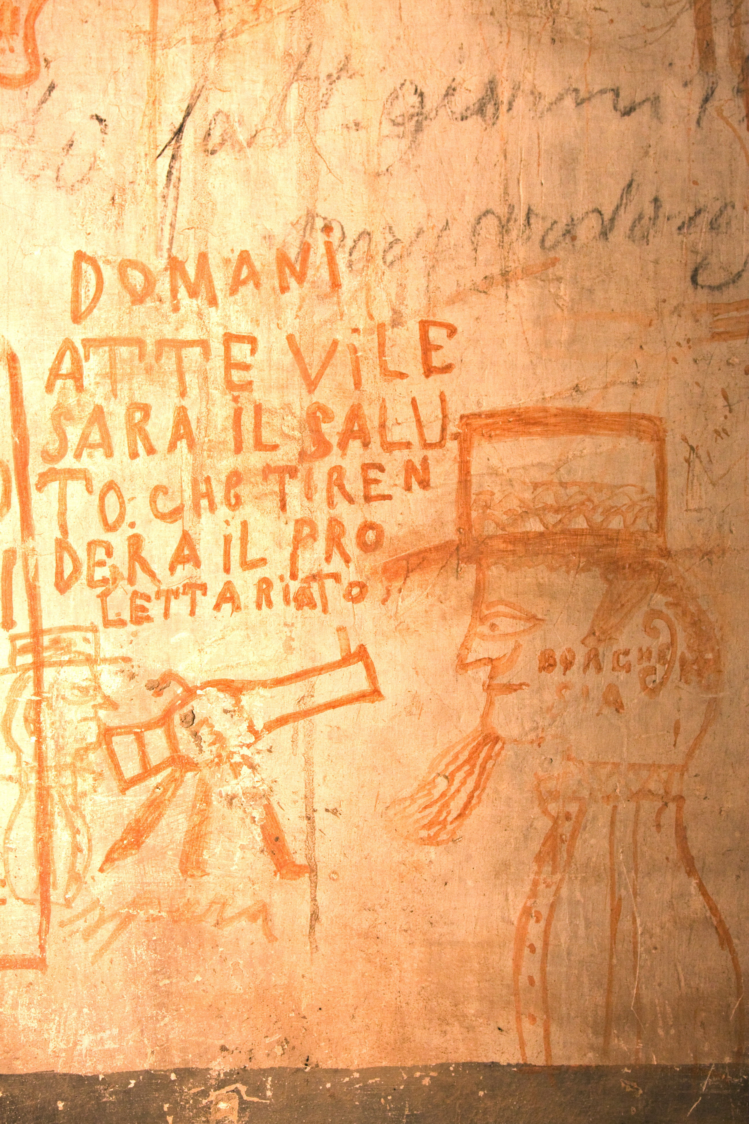 Scritta di un prigioniero. Carceri di Vicopisano. Scritta di un prigioniero socialista o anarchico.